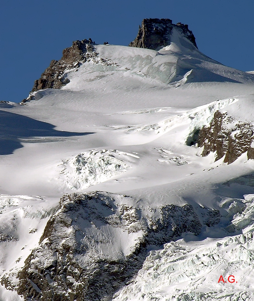 00102 la Punta di Ceresole - Alpi Graie - Italy